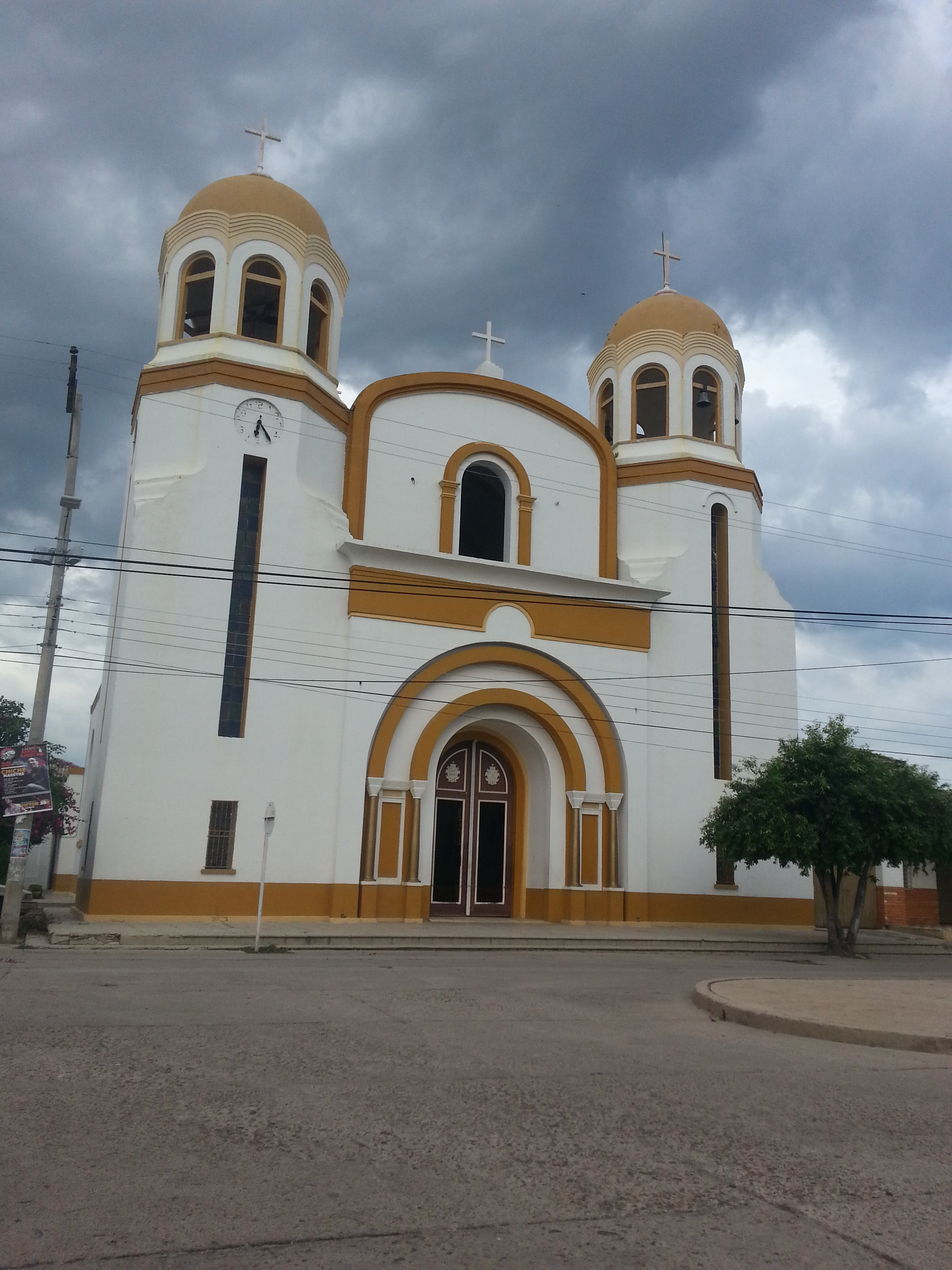 Iglesia San Juan Bautista ubicada en San juan del Cesar en el departamento de la Guajira